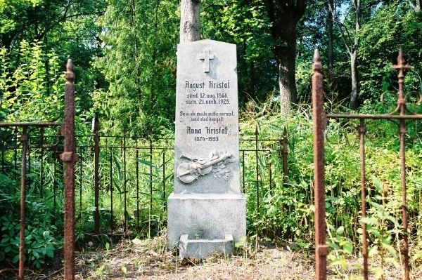 12 августа 1866 (58) Место рождения: Kose, Harjumaa Смерть: 21 февраля 1925 (58) Tallinn, Harjumaa